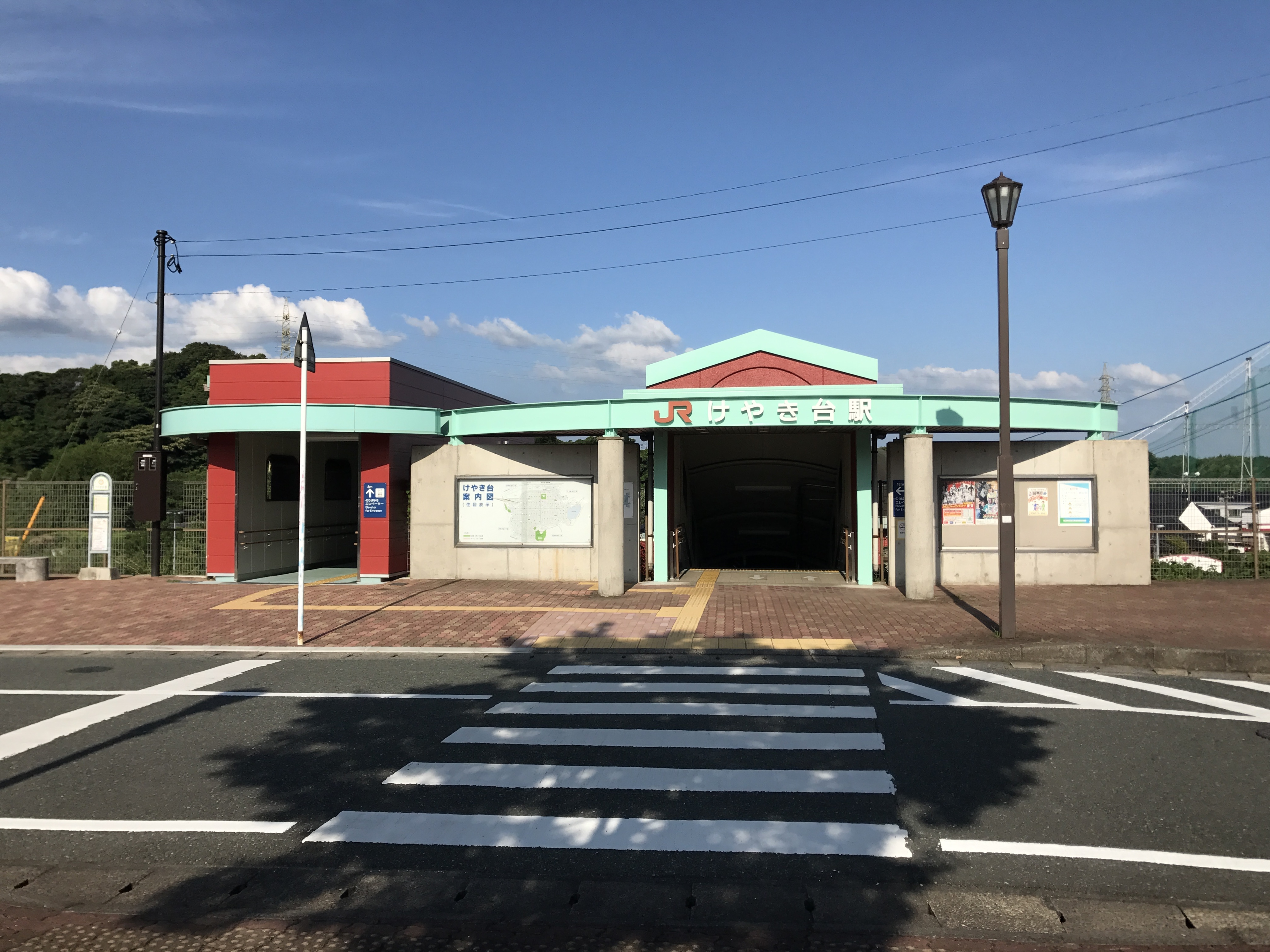 けやき台駅西口